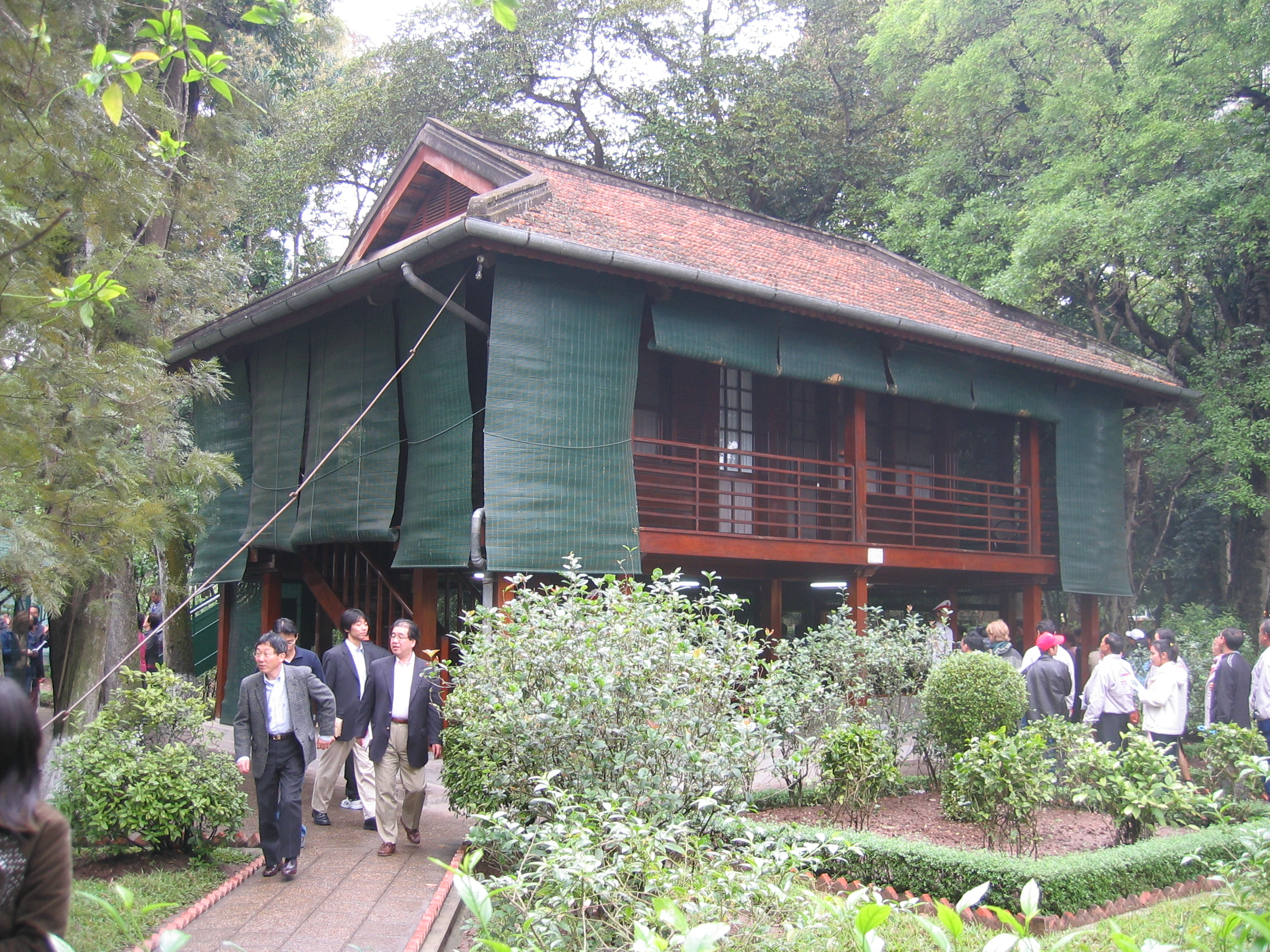 Wohnhaus von Ho Chi Minh Hanoi Vietnam